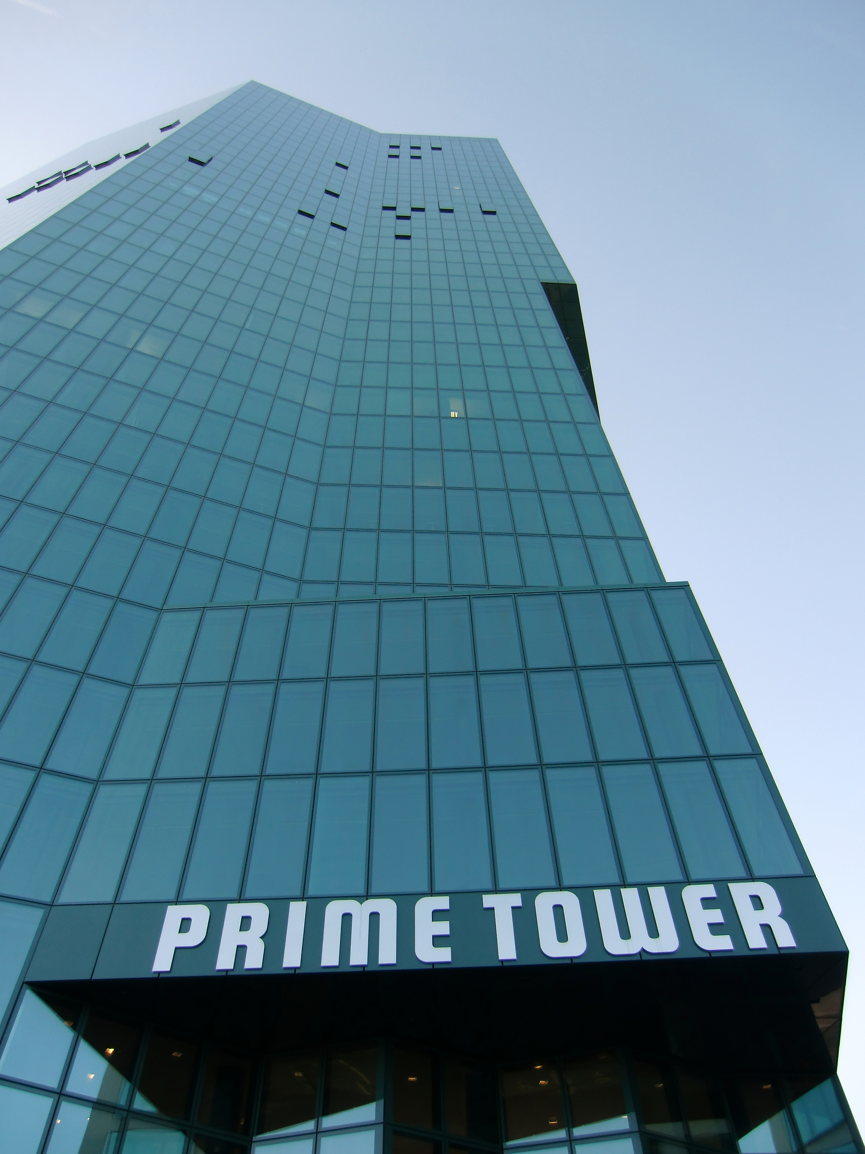 Ansicht des Prime Tower in Zürich nach der Vollendung Oktober 2011